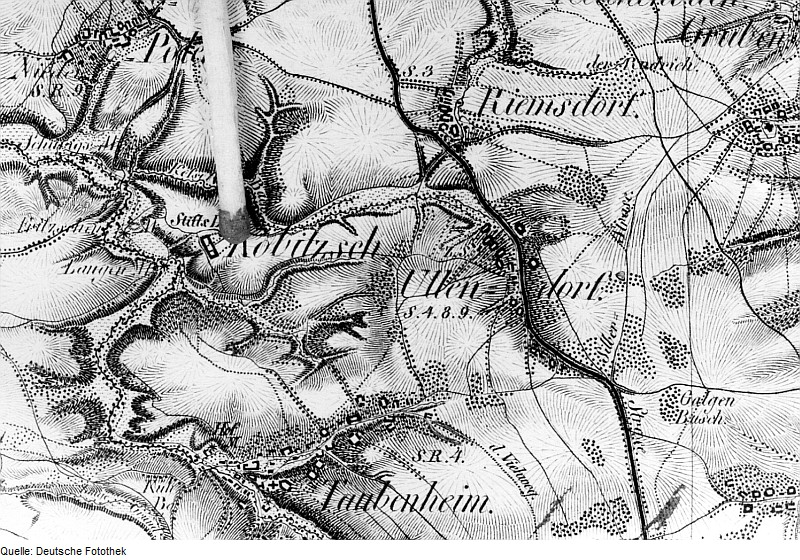 Original image description from the Deutsche Fotothek Triebischtal-Kobitzsch. Oberreit, Sect. Dresden, 1821/22